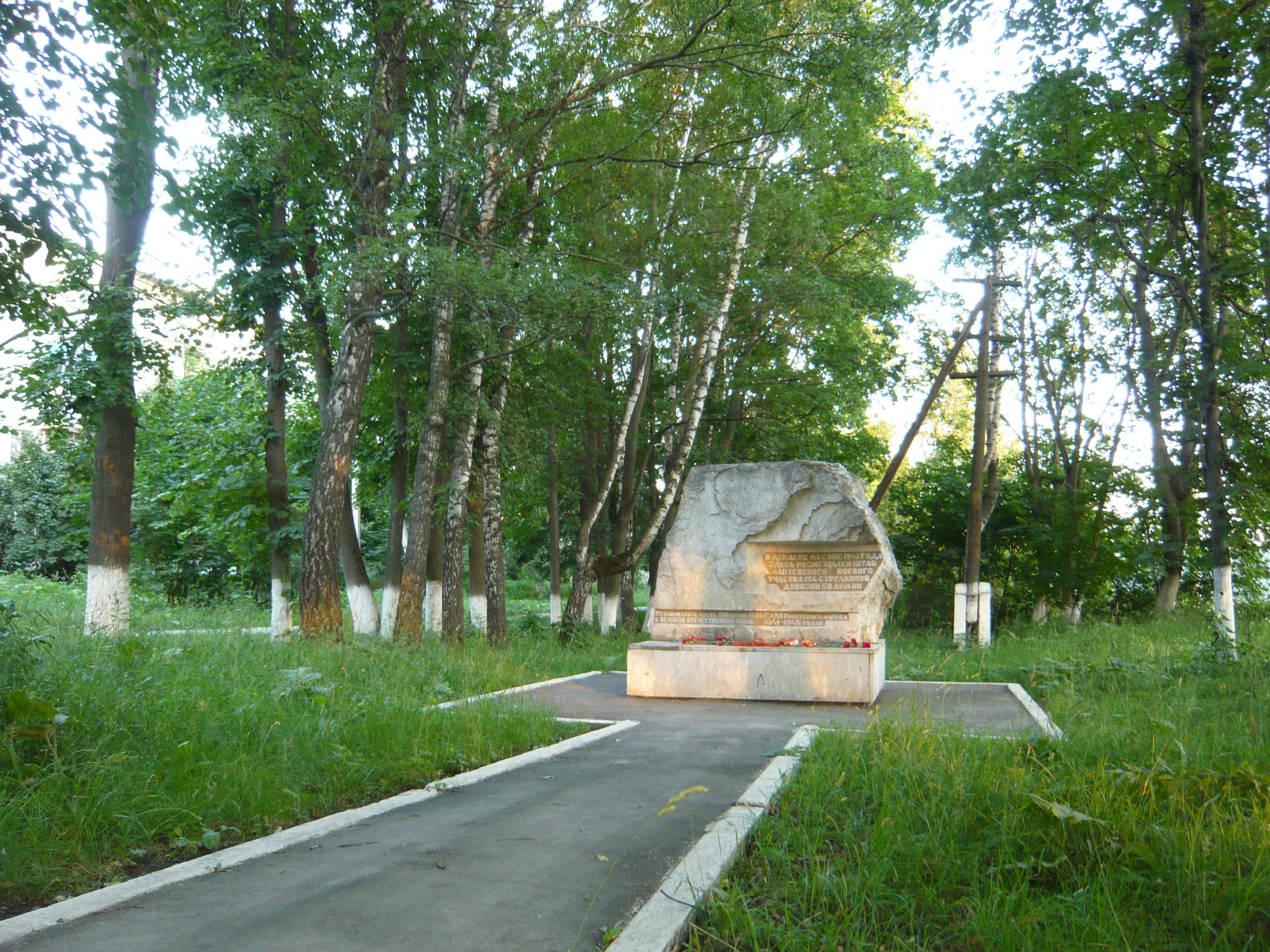 Яснгогорск, Тульская обл. Памятный знак на ул. Советской